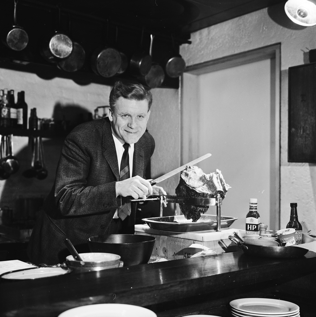 Hroar Dege (1930–2003) var en norsk kokk, forfatter og forretningsmann, eier og driver av spisestedene «Det blå kjøkken» på Solli plass (som senere fikk navnet «Tre Kokker») og «Soria Moria Restaurant» på Torshov.